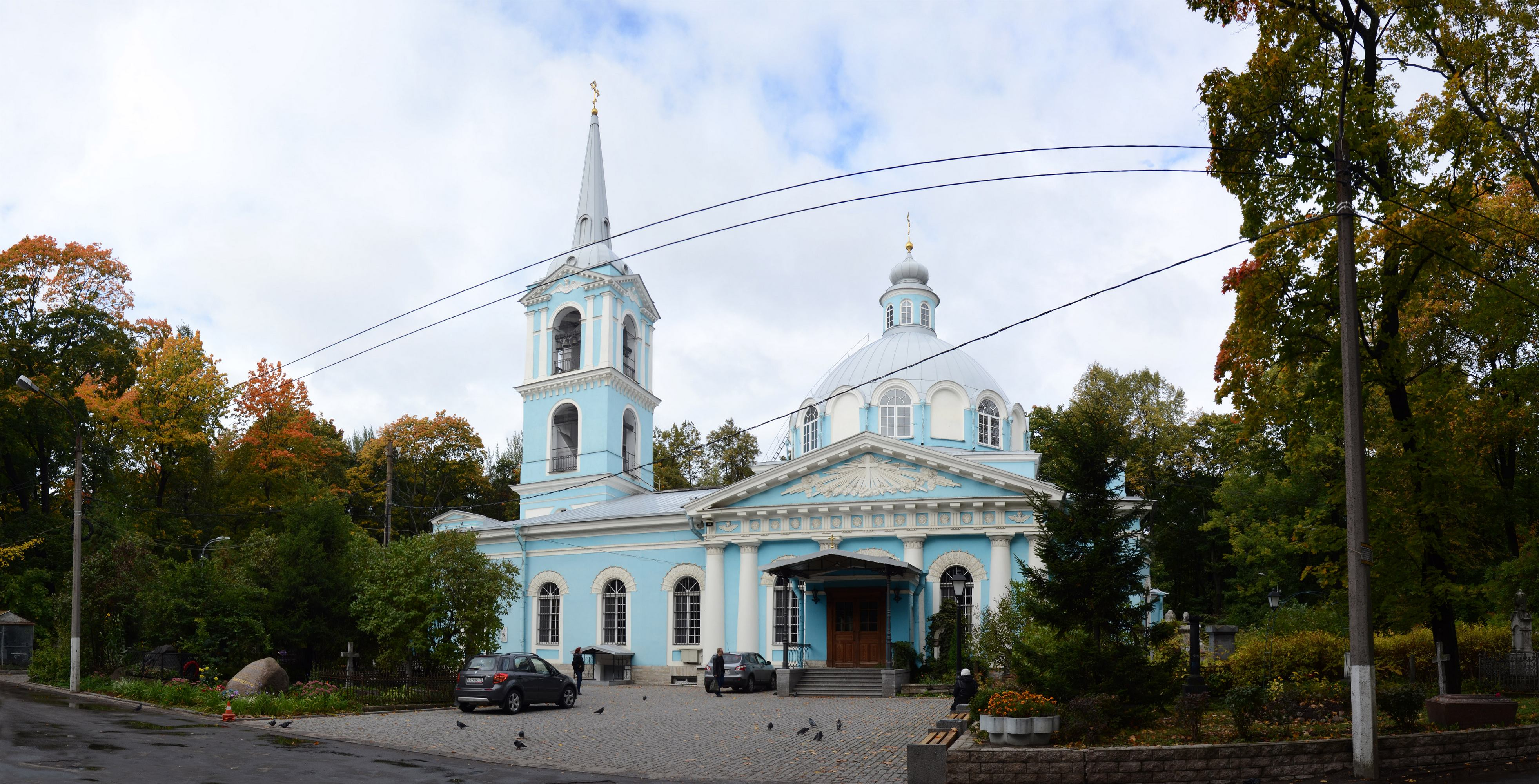 Церковь Смоленская (Санкт-Петербург и Лен.область, Санкт-Петербург, Камская улица, 24)